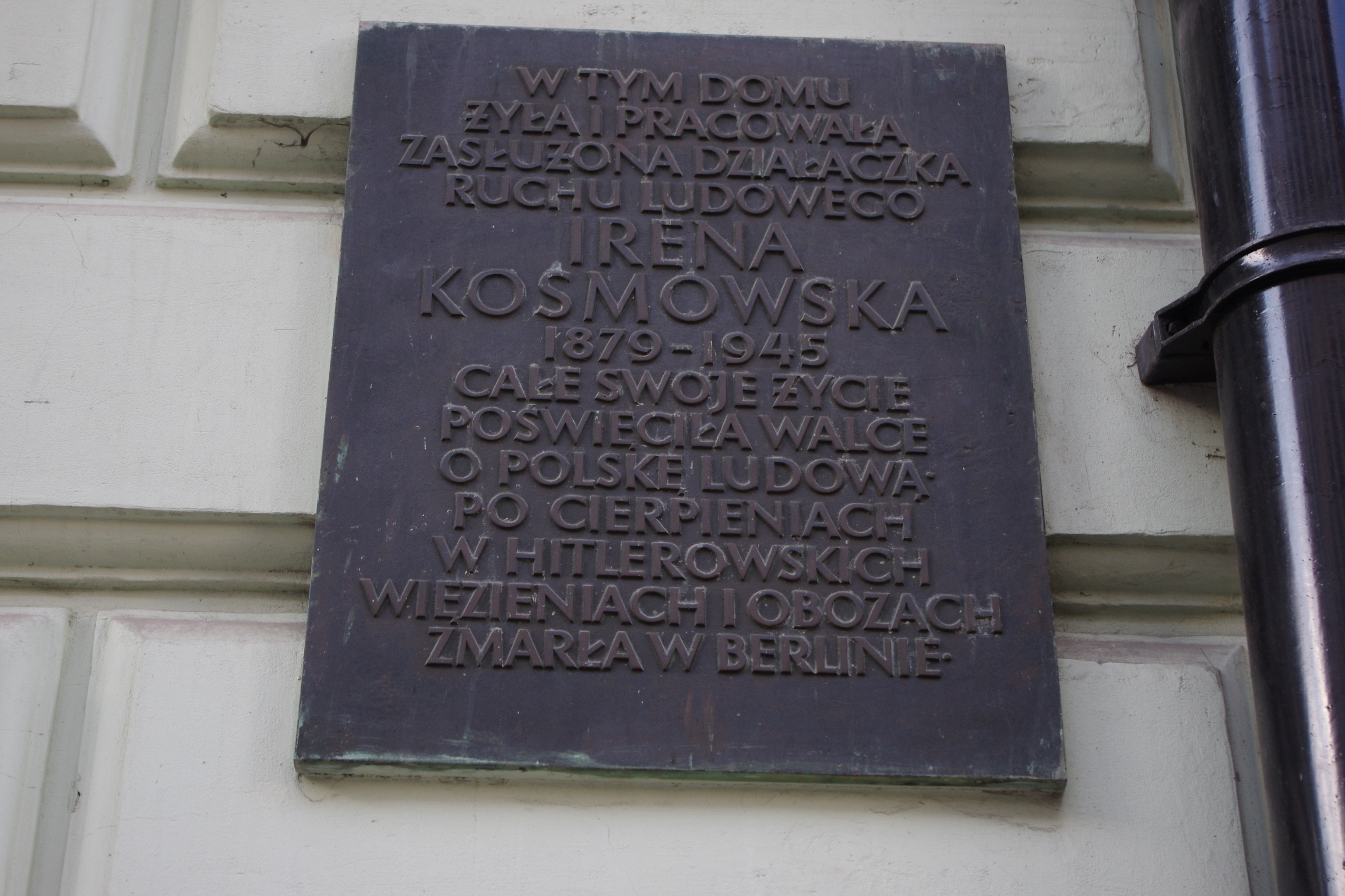 Tablica upamiętniająca działaczkę niepodległościową i oświatową Irenę Kosmowską (1879-1945) na ul. Nowogrodzkiej 42 w Warszawie